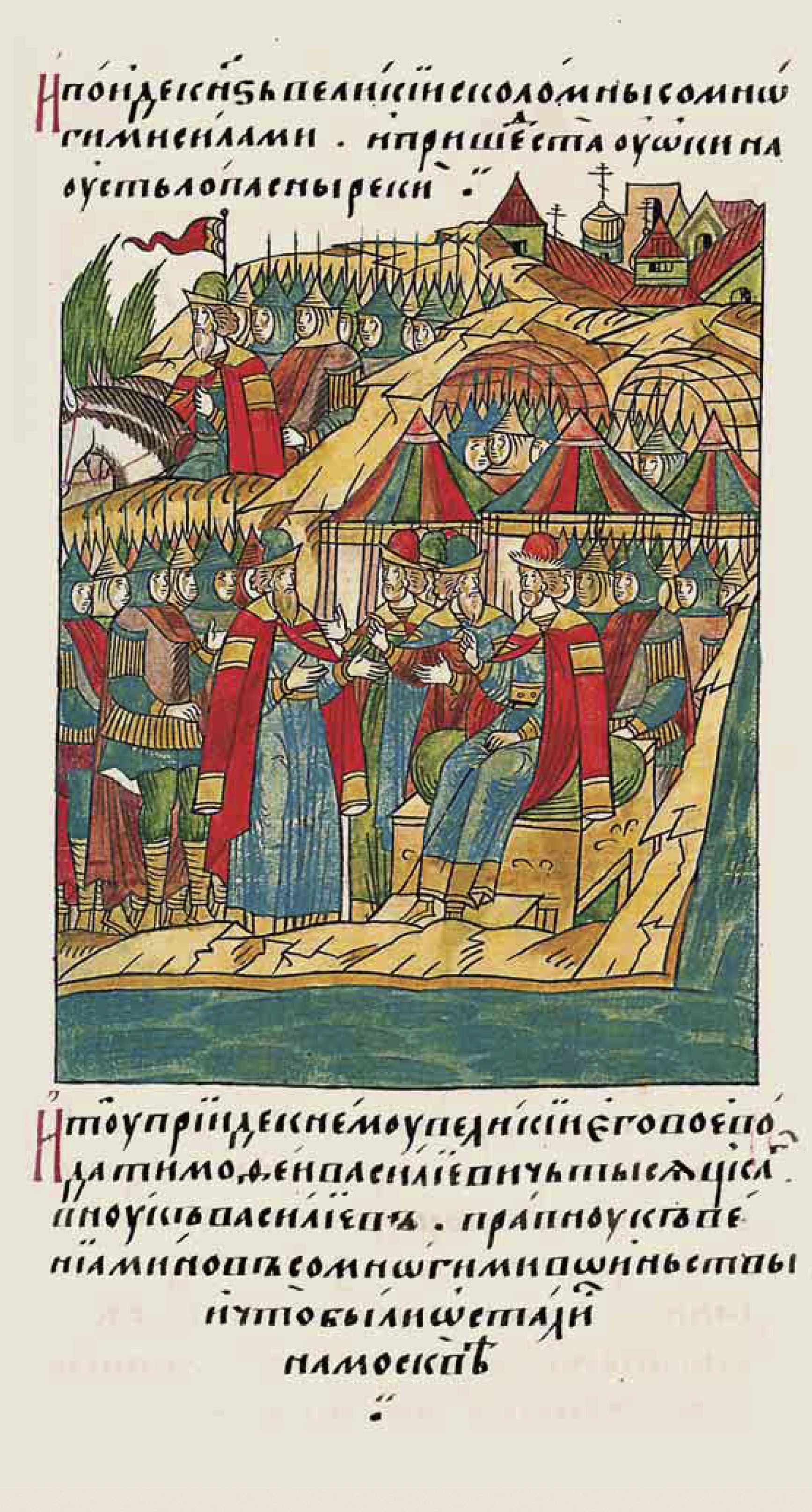 И туда пришел к нему великий его воевода Тимофей Васильевич, тысяцкий, внук Васильев, правнук Вениаминов, со многим воинством, которое оставалось на Москве.